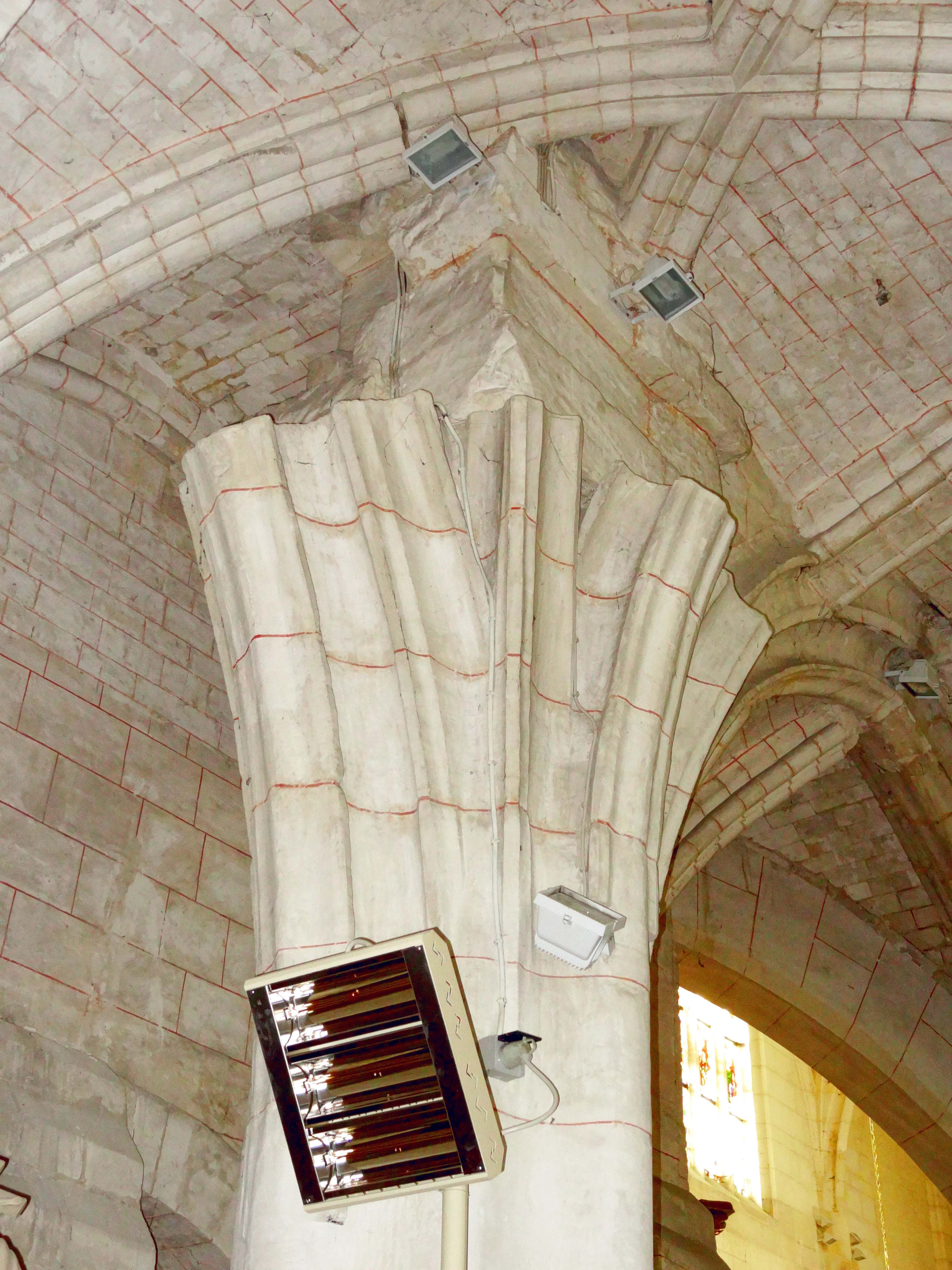 Intérieur de l'église - voir titre.